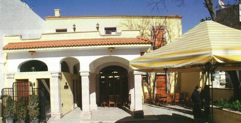 Burhaniye